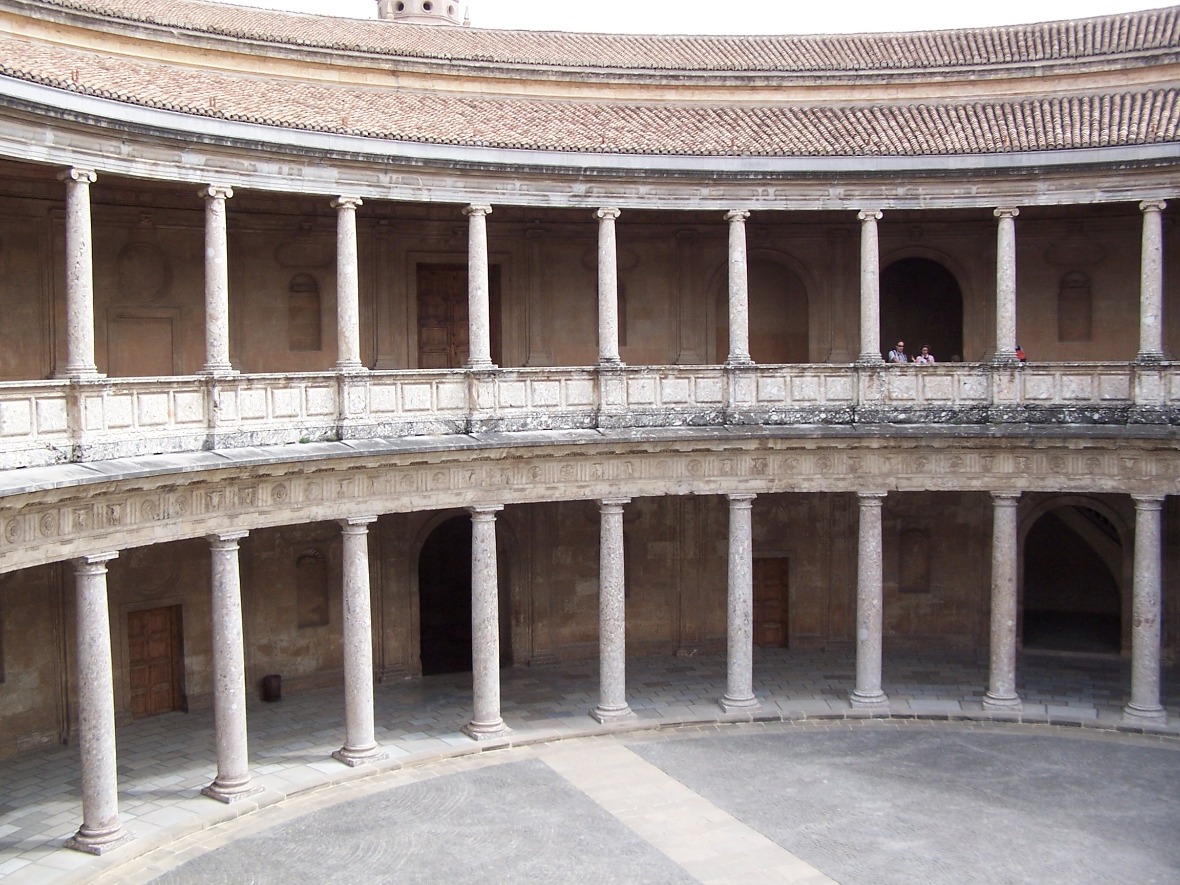 Vista interior desde el pórtico superior del palacio de Carlos V. Alhambra, Granada, España. Notas: La forma interior del palacio es circular, siendo la exterior cuadrada.